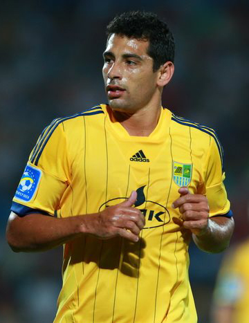 Говерла 0:2 Металлист